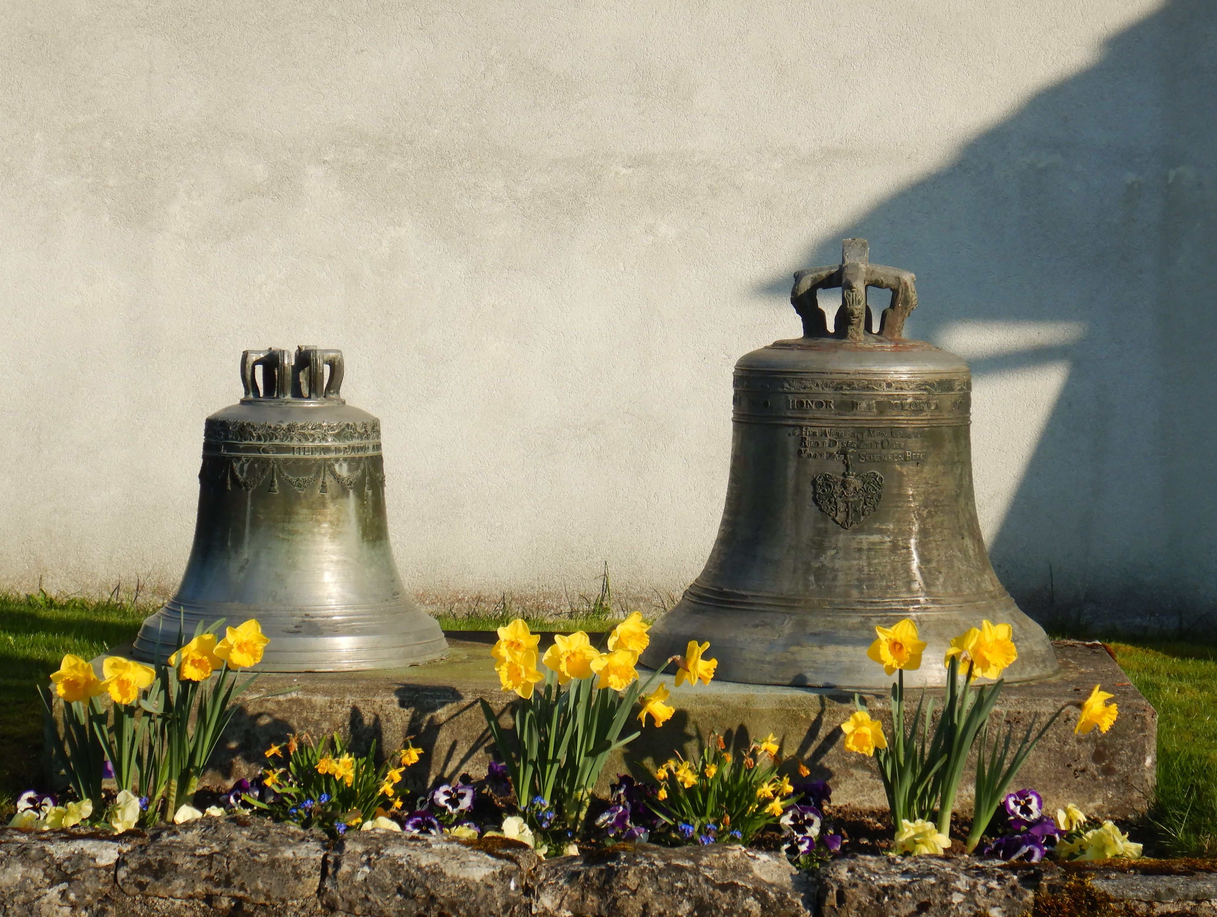 Zweite (1825) und erste (1663) Glocken der Reformierten Kirche Densbüren.